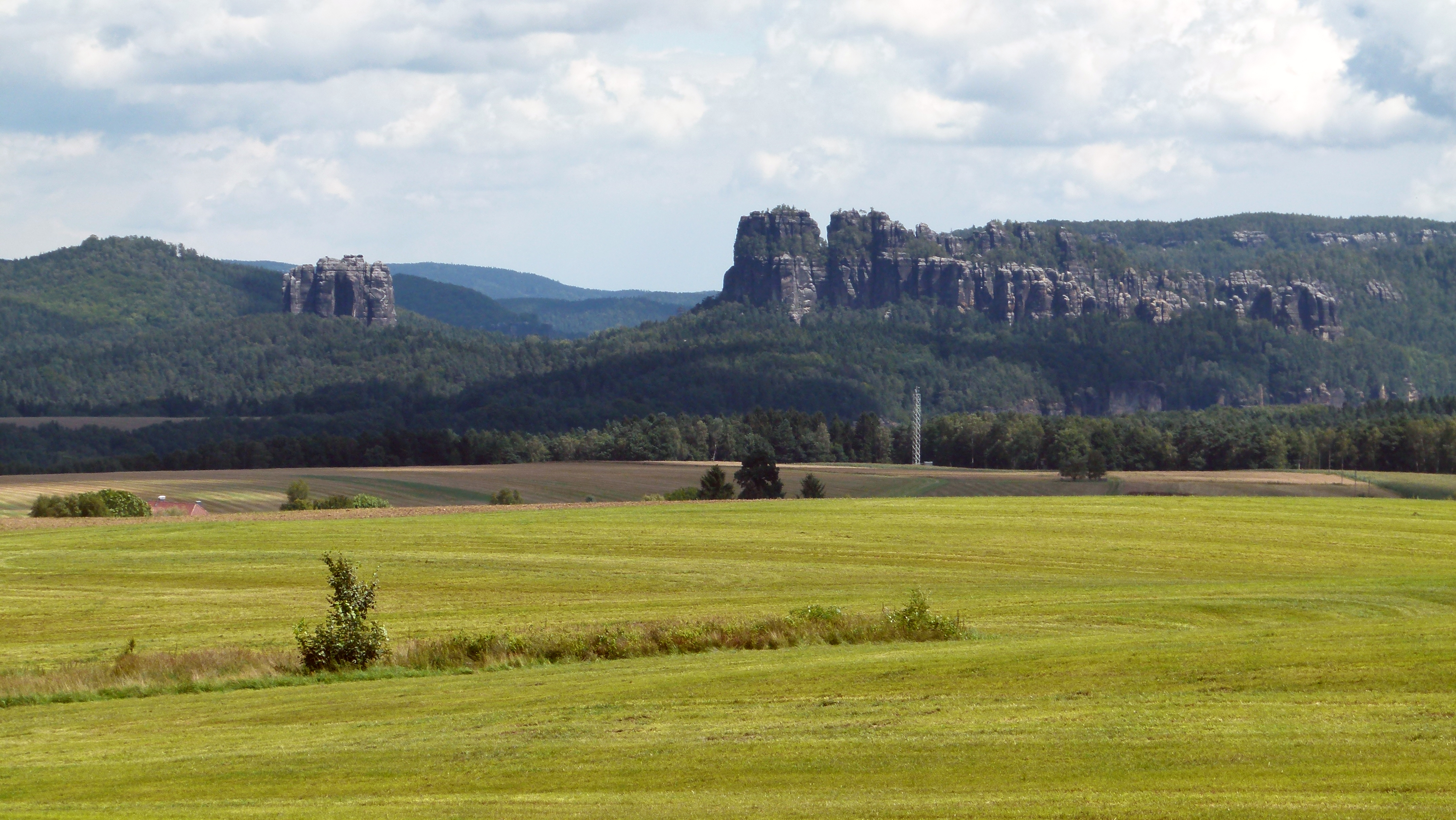 Blick auf die Schrammsteine von Kleinhennersdorf aus